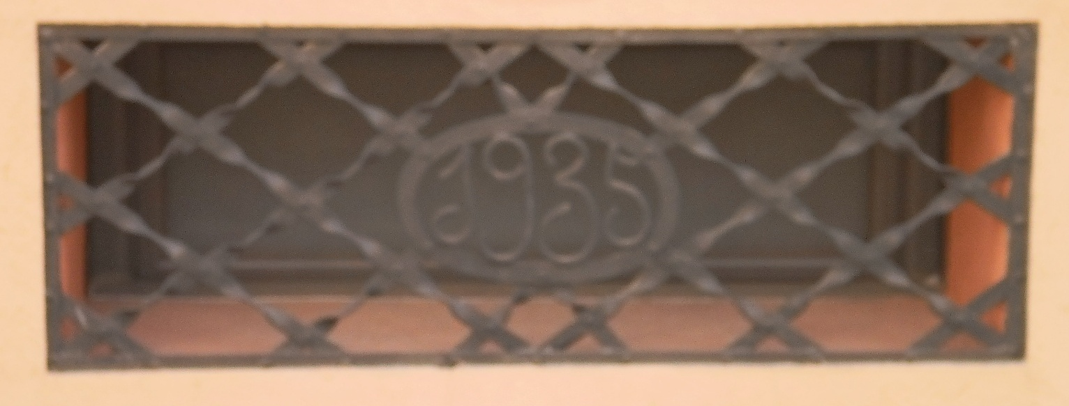 Reixa sobre una llinda al carrer Nou de la Pobla de Lillet